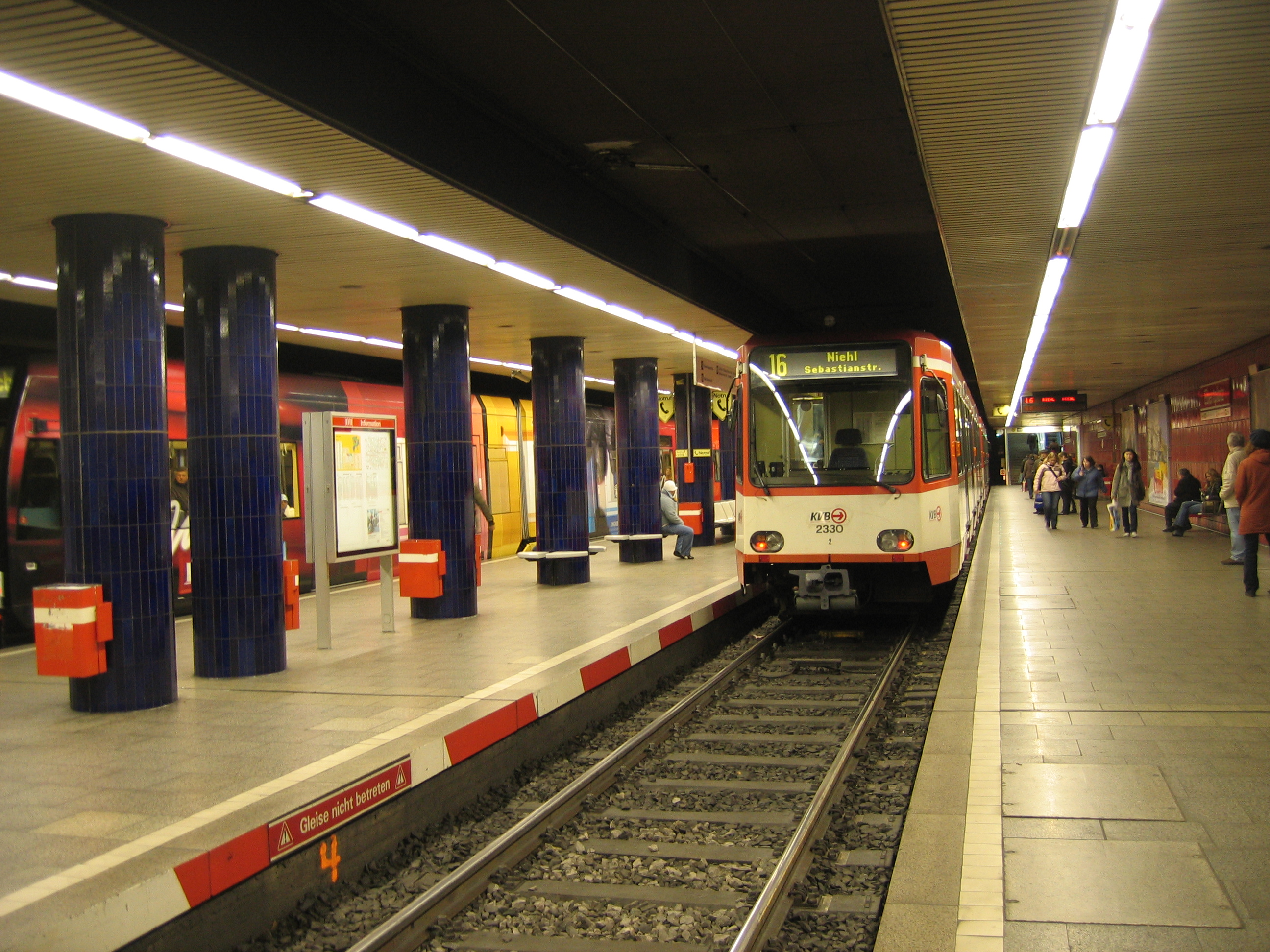 U-Bahnhof Ebertplatz der Stadtbahn Köln; Zustand vor dem Umbau 2009